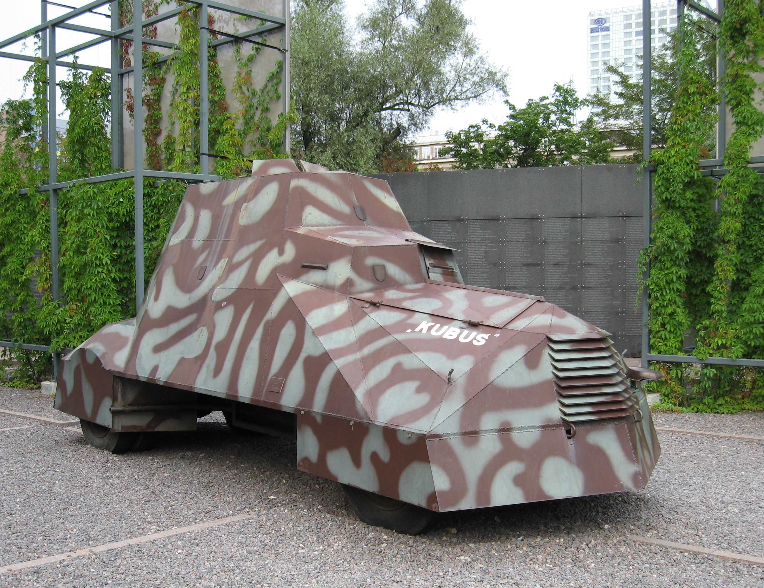 Muzeum Powstania Warszawskiego - wóz bojowy "Kubuś"